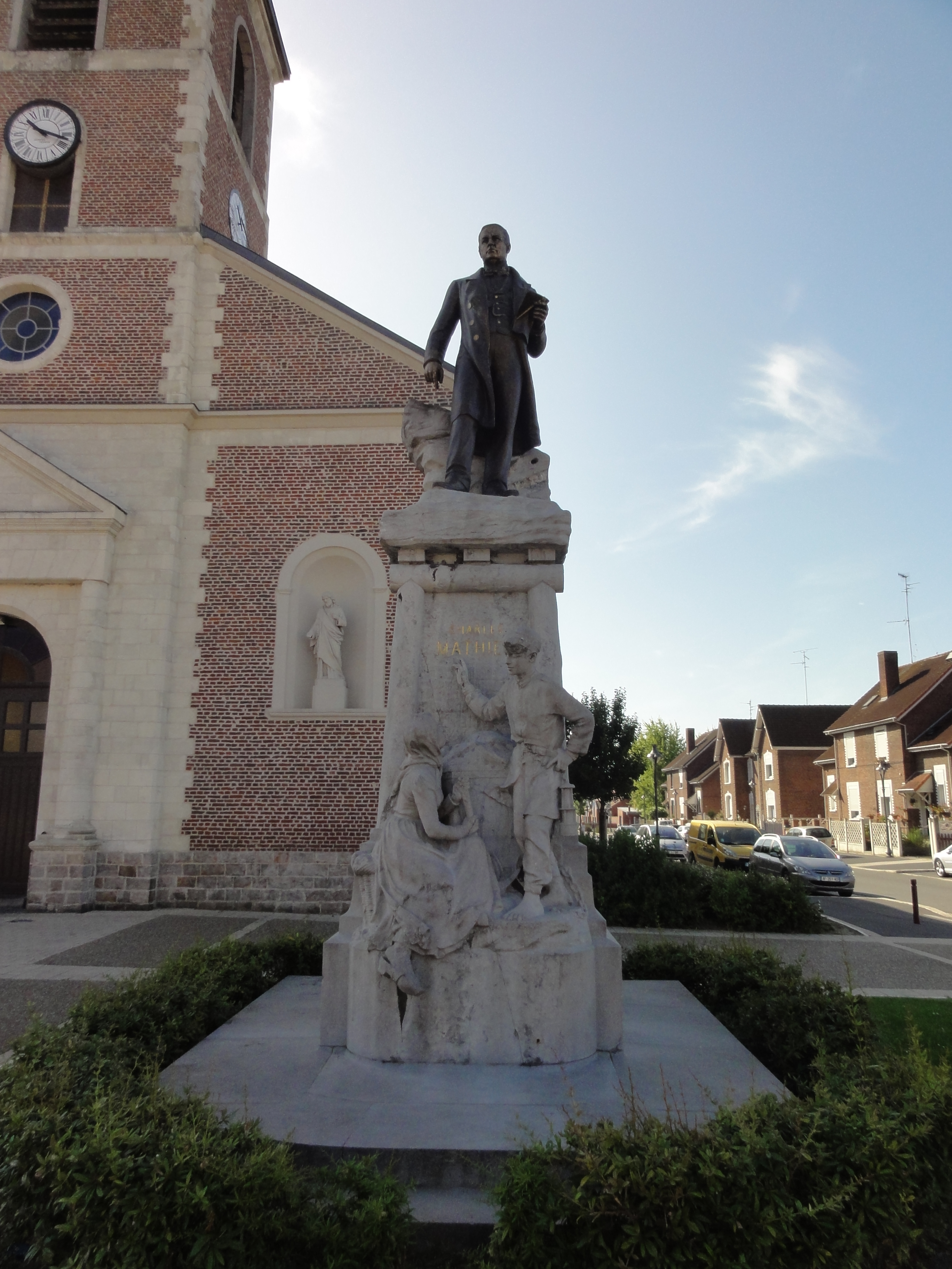 Monument à Charles Mathieu, Compagnie des mines de Douchy, Lourches, Nord, Nord-Pas-de-Calais, France. .